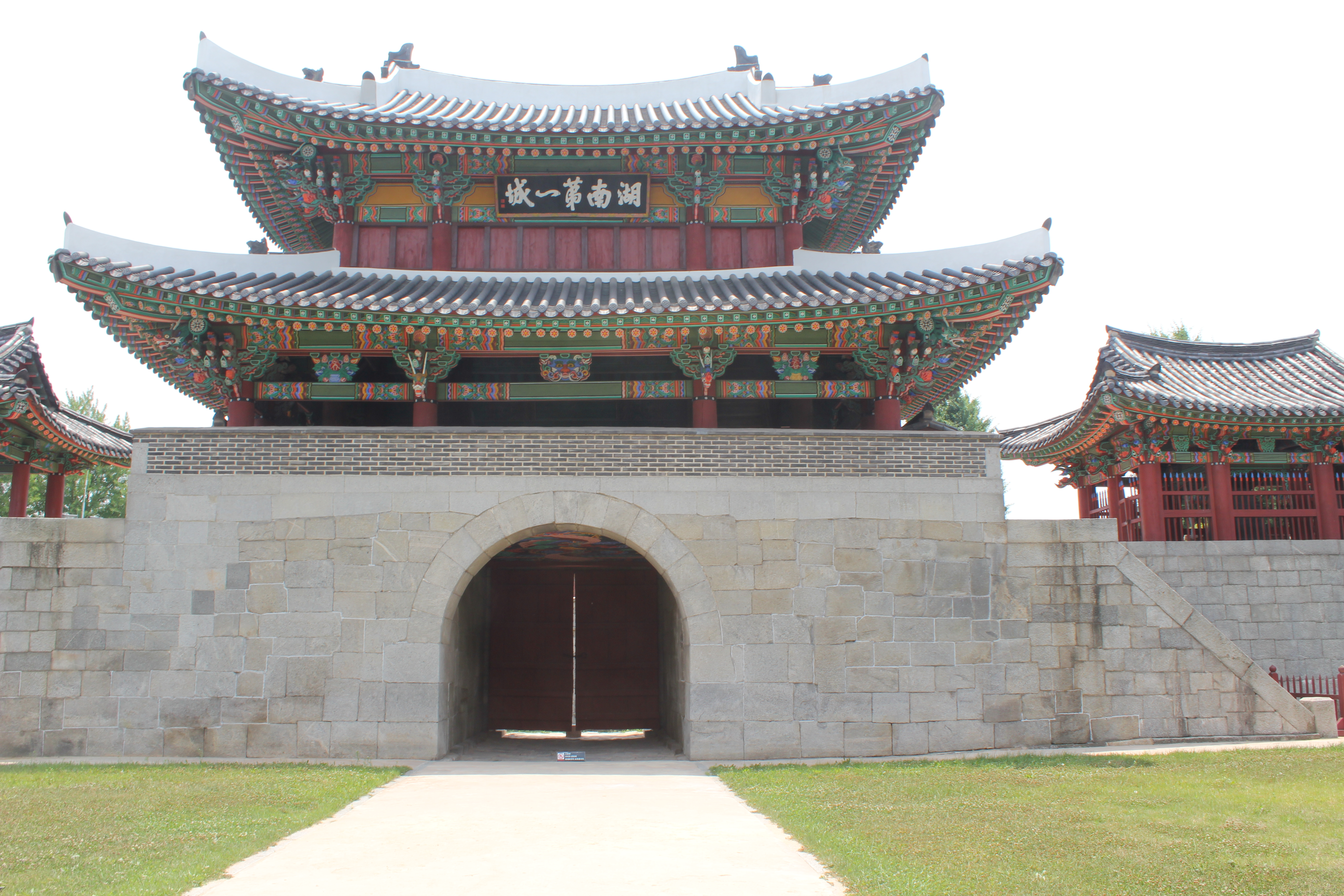 풍남문 사진